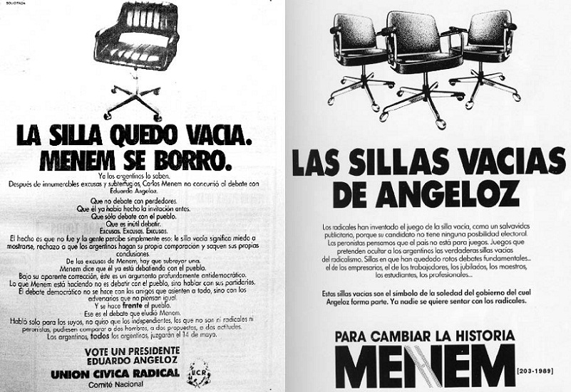 Afiches de campaña de la Unión Cívica Radical (izquierda) y el Frente Justicialista Popular (derecha) para las elecciones presidenciales de Argentina de 1989. La UCR hizo campaña atacando la ausencia de Menem en el debate presidencial destinado a realizarse el 8 de mayo de 1989, mientras que el FREJUPO atacó al radicalismo por su "ausencia" ante diversos "debates" con el país.